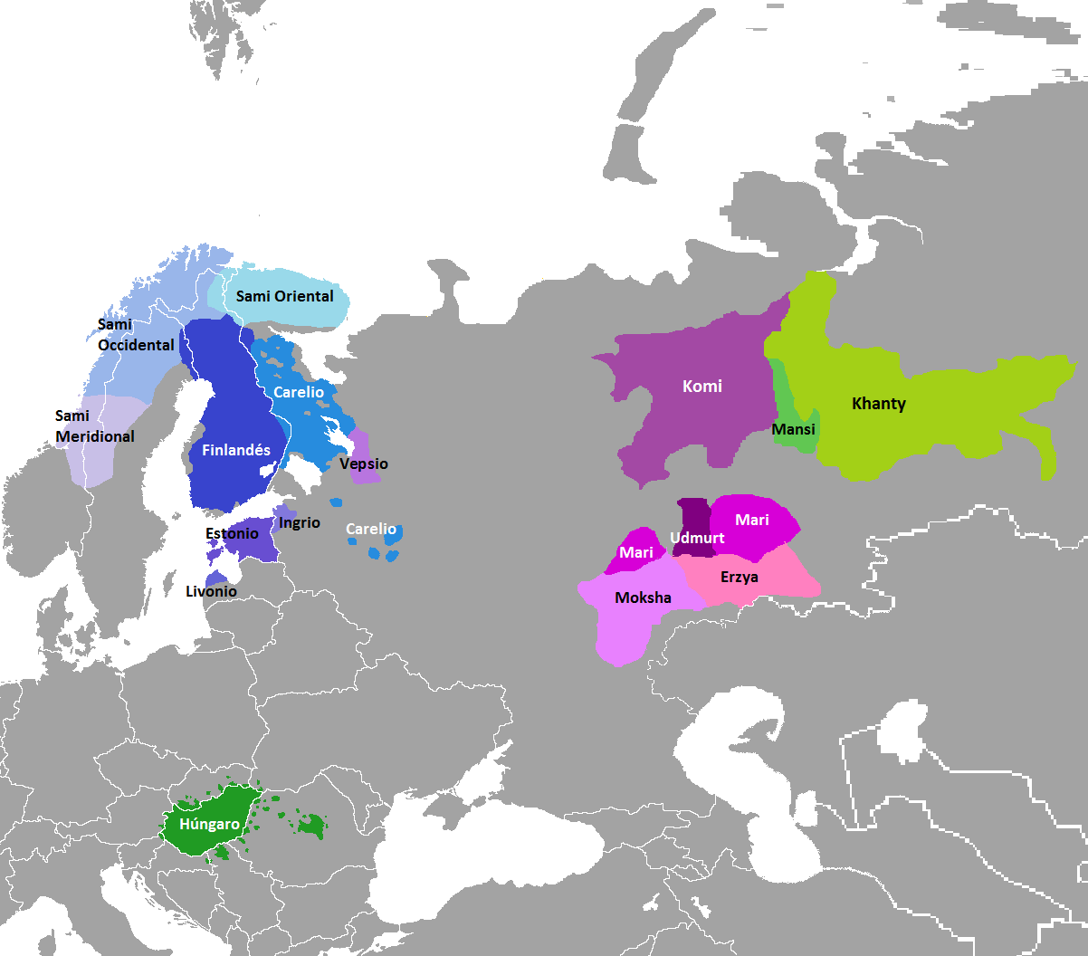 Lenguas fino-ugrias